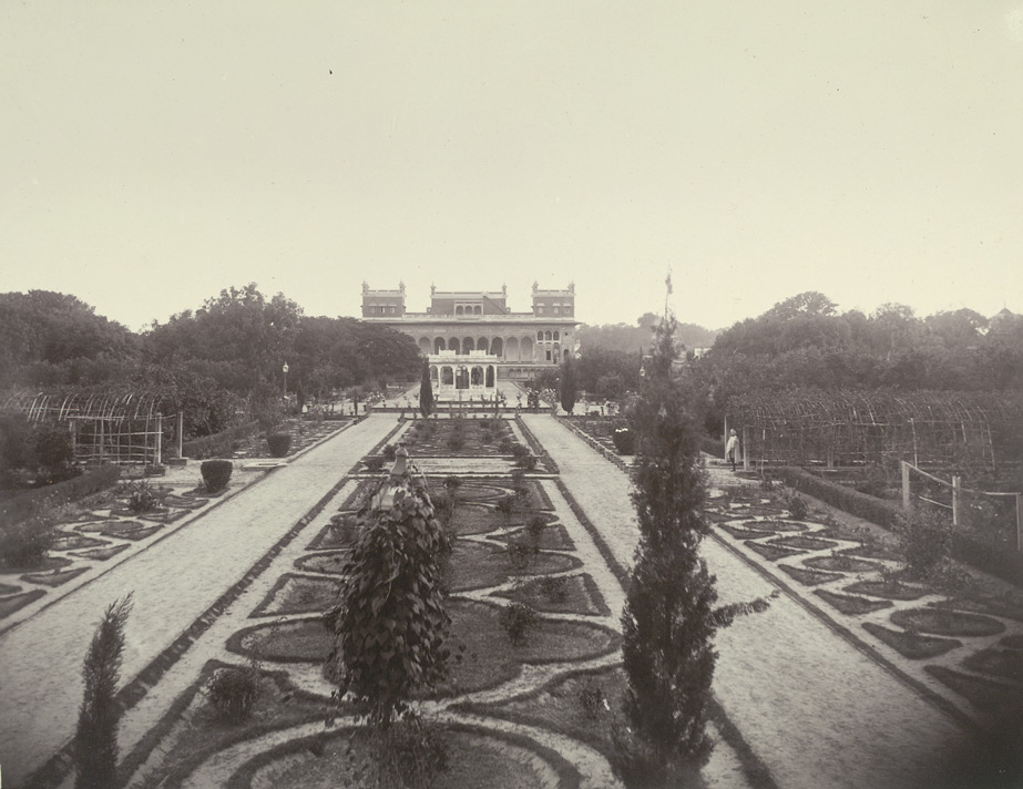 Rambag_(Ramnagar)_[Benares]